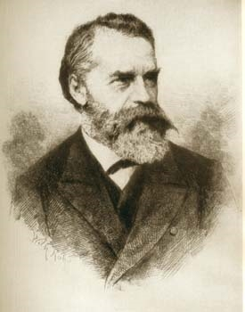 Ferdinand Gregorovius, Civis romanus. 1888 schenkte Gregorovius das Bild seinen Corpsbrüdern.